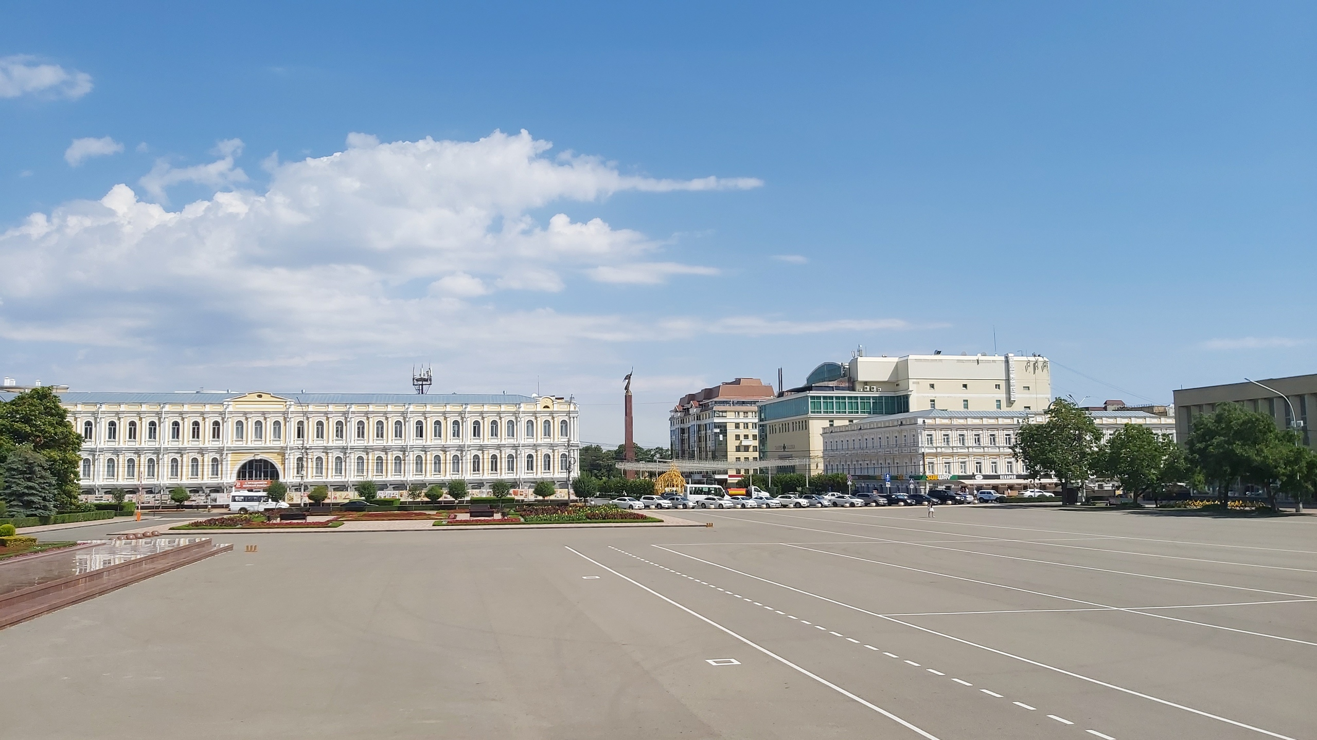 Панорама центральной площади Ставрополя